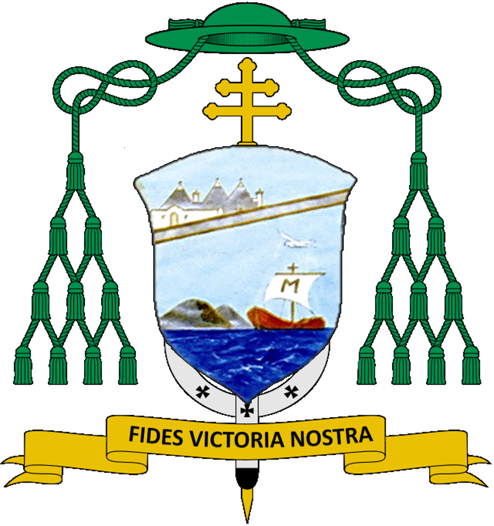 Stemma di Cosmo Francesco Ruppi